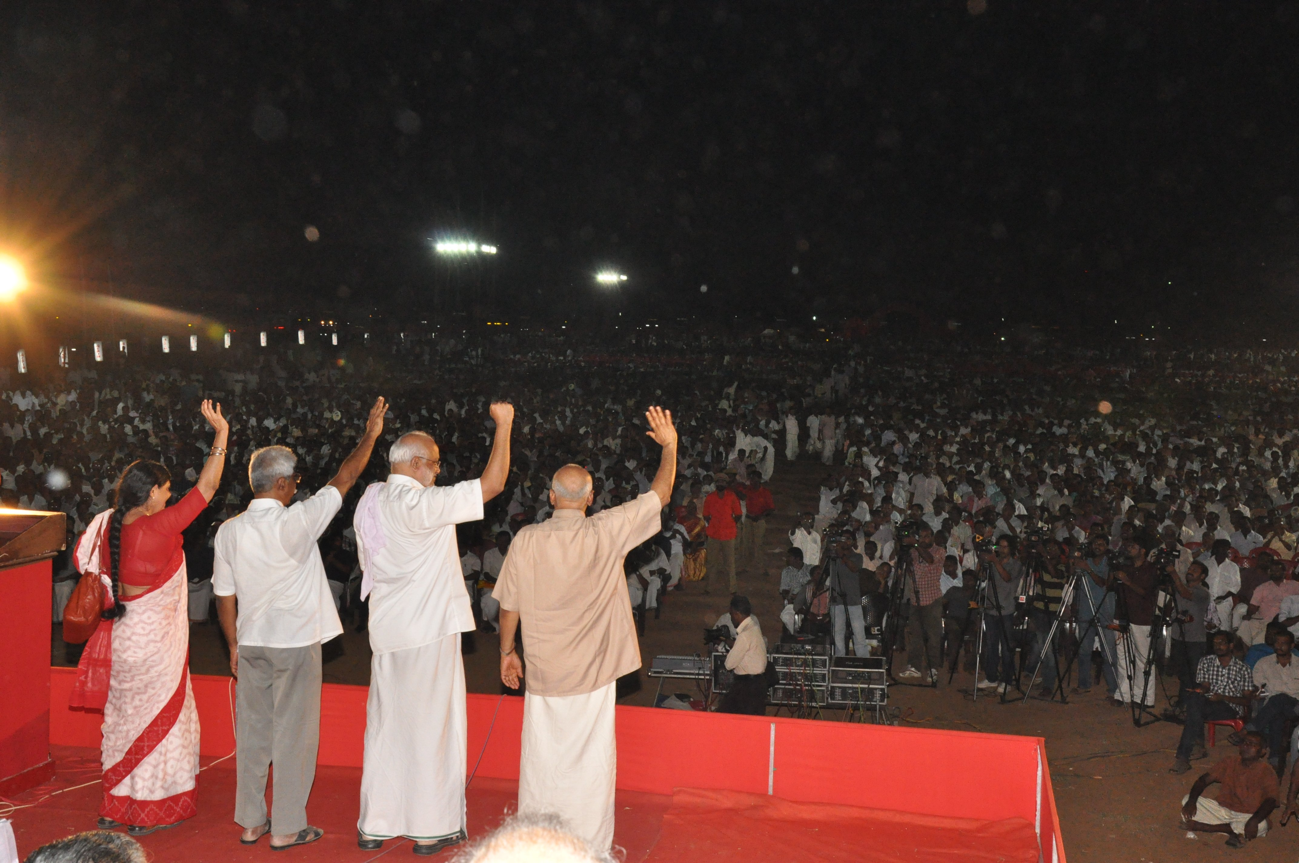 സി.പി.ഐ.എം. സമര സന്ദേശ ജാഥ കൊല്ലത്തെത്തിയപ്പോള്‍ തെക്കന്‍ ജാഥാ ക്യാപ്റ്റന്‍ എസ്. രാമചന്ദ്രന്‍ പിള്ള, എ.എ. ബേബി, സുധ സുന്ദരരാമന്‍ തുടങ്ങിയവര്‍ അഭിവാദ്യം ചെയ്യുന്നു